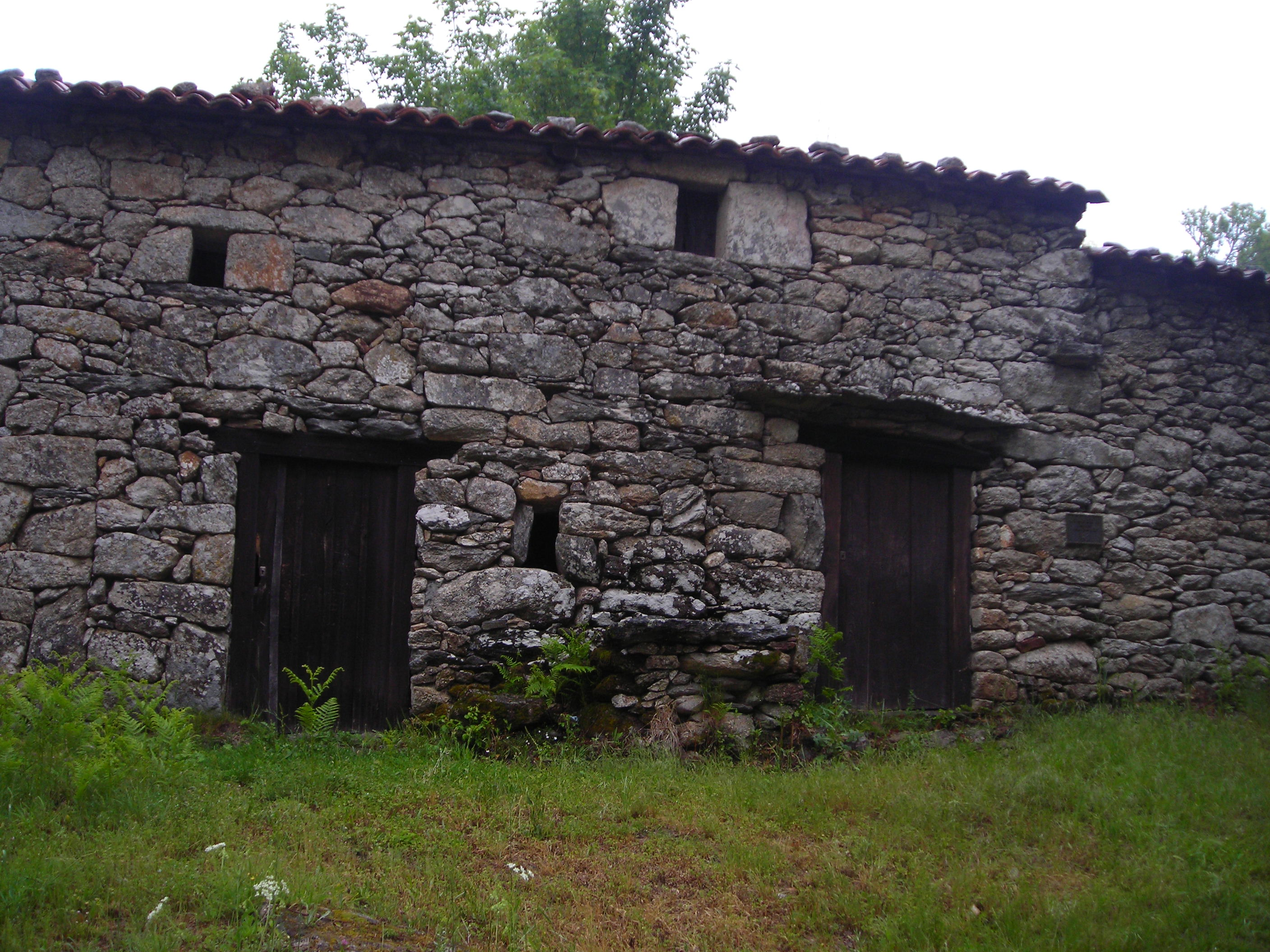 sequeiros